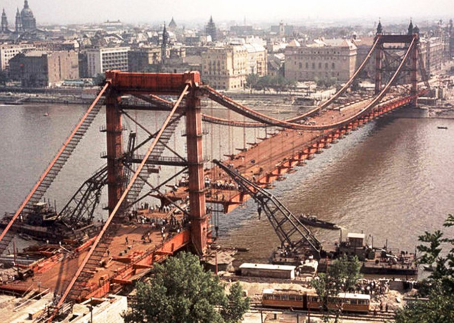 Az Erzsébet híd újjáépítése